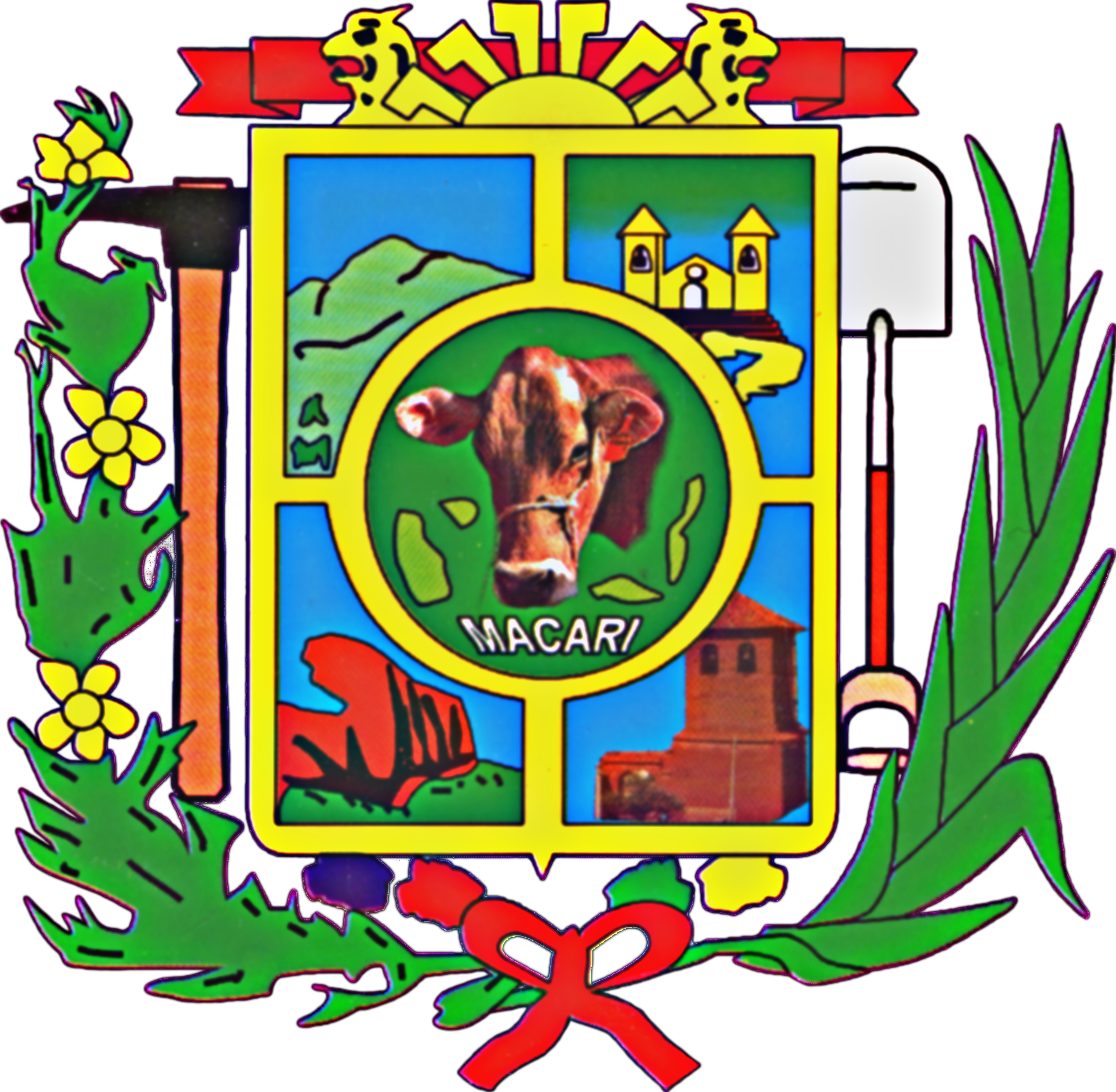 Escudo de Macarí